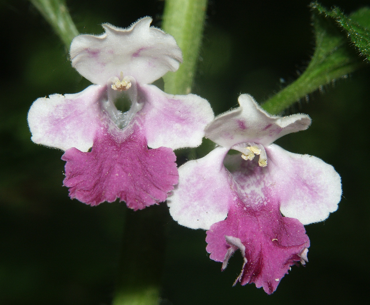 Melittis melissophyllum, Hohenloher Land, Germany